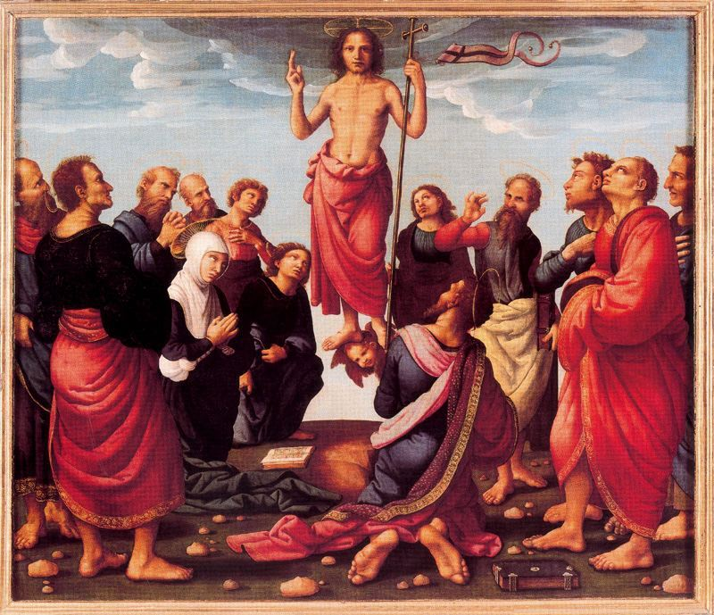 Ascensión,óleo sobre tabla, 194 x 227 cm., Retablo mayor de la catedral de Valencia.